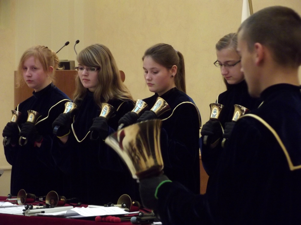 Zdjęcie zrobione podczas wizyty pary prezydenckiej Republiki Czeskiej w Krakowie.